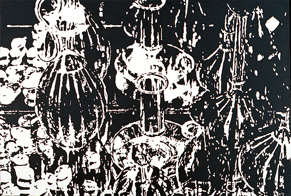 Mário Röhnelt (Pelotas/RS, 1950): sem título, acrílico sobre lona, 1991. Doação da AAMARGS. Acervo do Museu de Arte do Rio Grande do Sul Ado Malagoli.